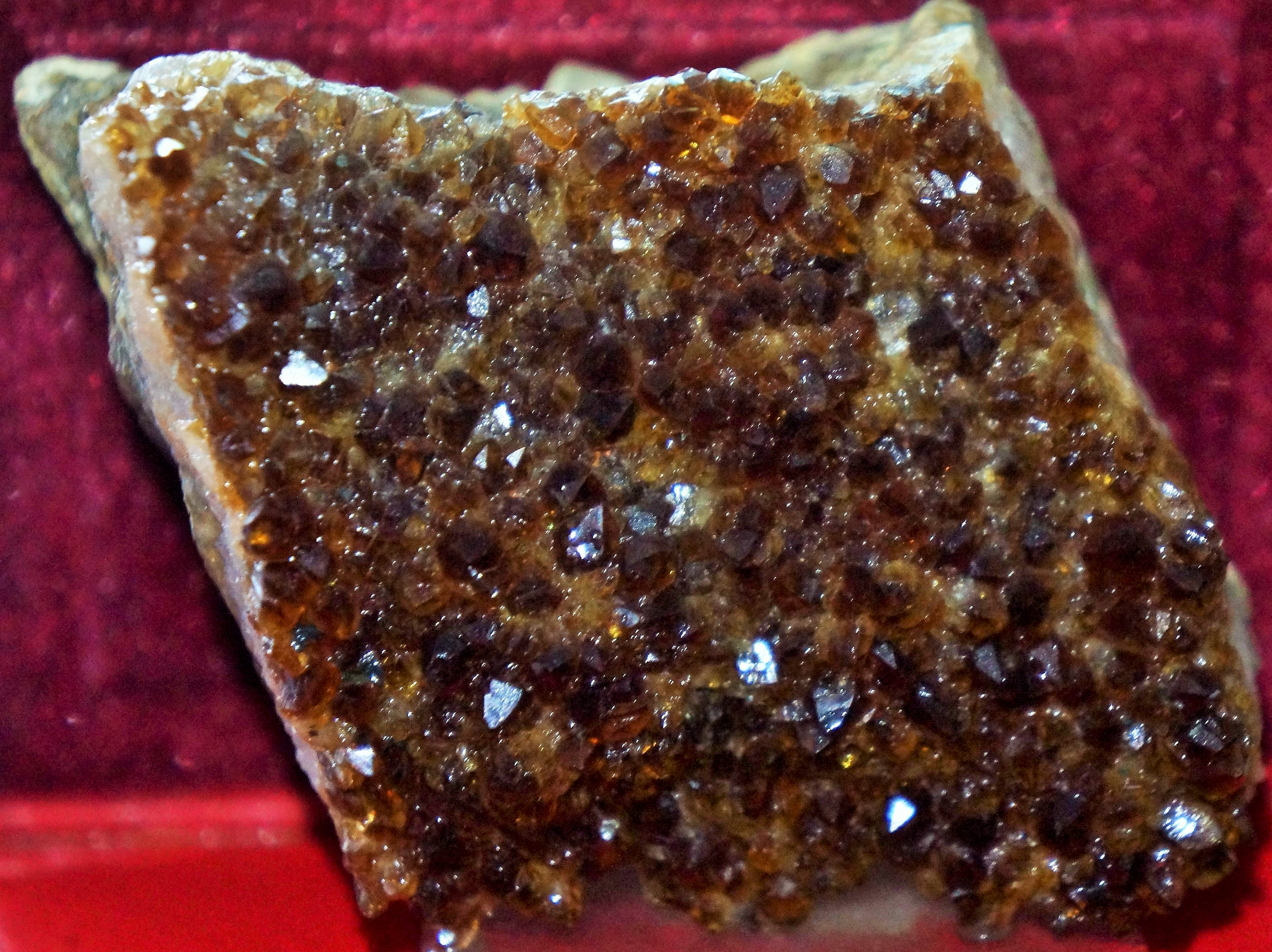 Quartz Citrine (6x6 cm)- Minas Gerais - Brésil